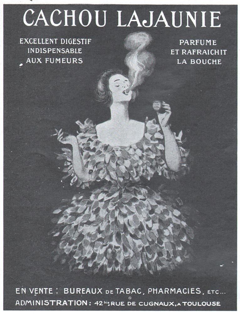 Advert in L'illustration 03/06/1922